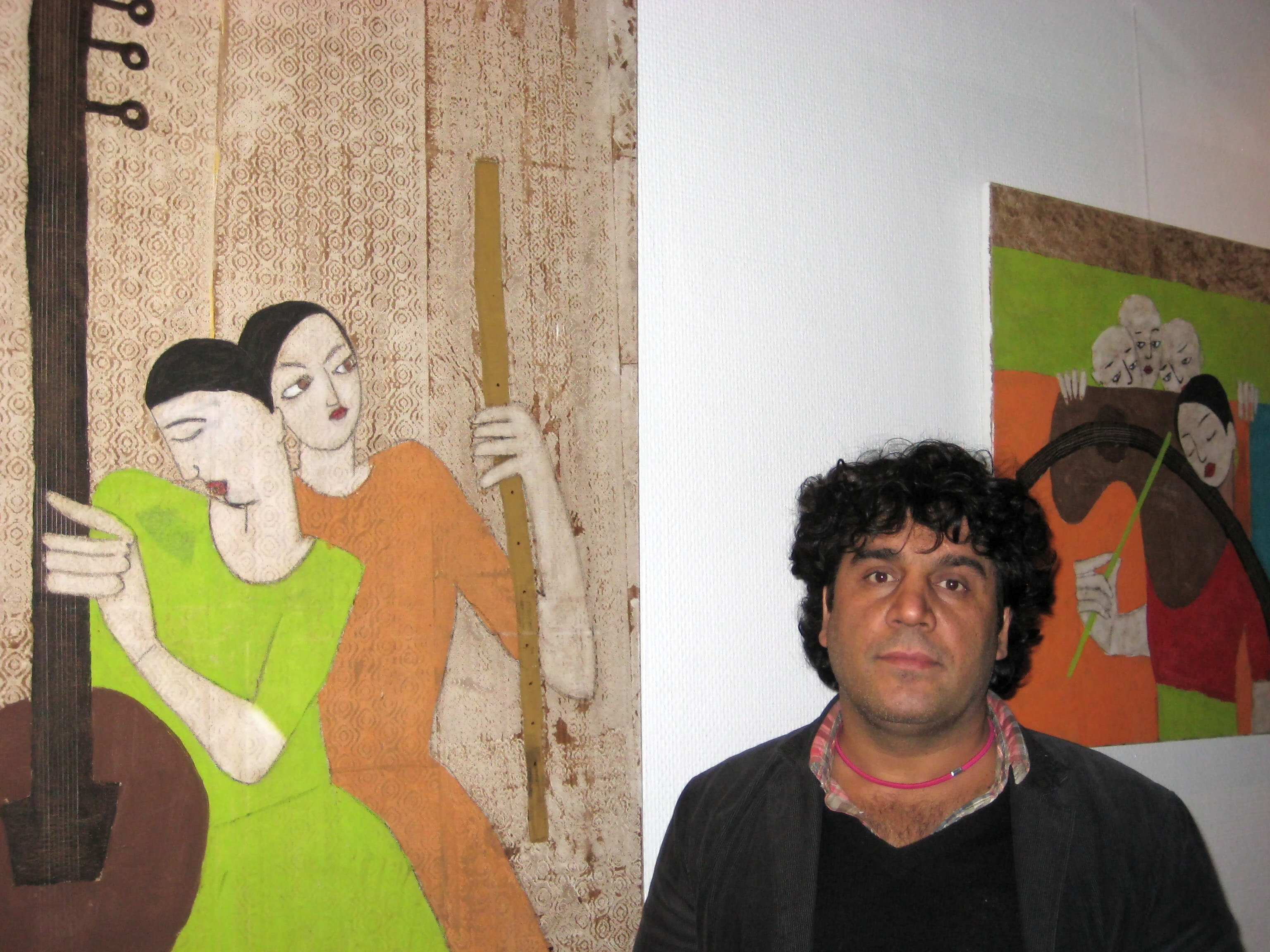 Rodi Khalil (* 1973), syrischer Künstler kurdischer Volkszugehörigkeit; lebt seit 2003 in Deutschland. Mit zwei Bildern aus seiner Serie und gleichnamigen Ausstellung „Musik – Sprache der Welt“ im Januar 2012 im Bürgerhaus Neue Vahr in Bremen, Deutschland.